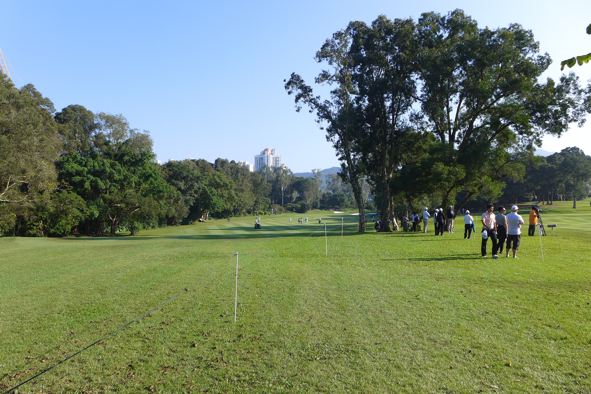 Hong Kong Golf Club Fanling Hole 15